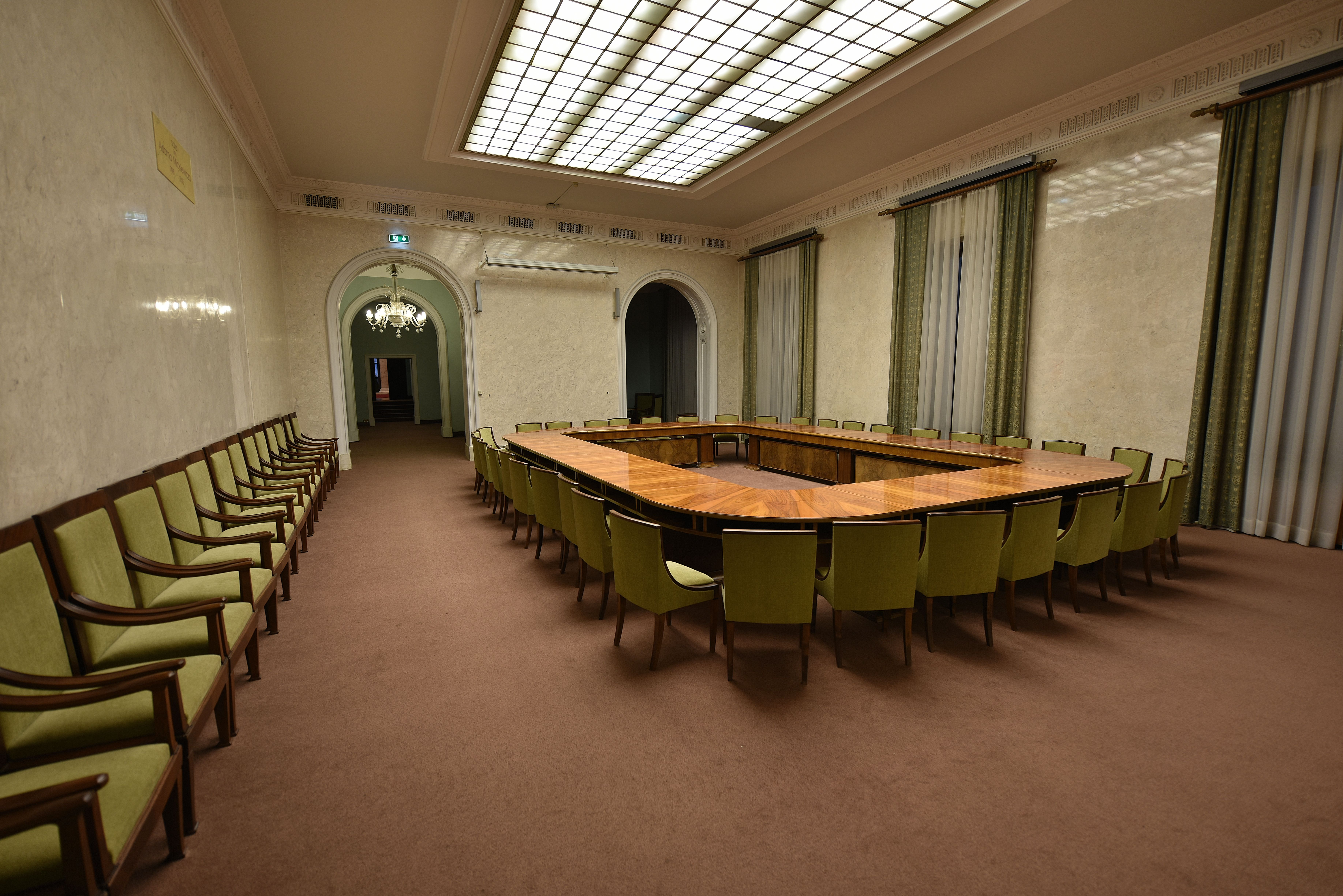 Sala im. Adama Mickiewicza w Pałacu Kultury i Nauki